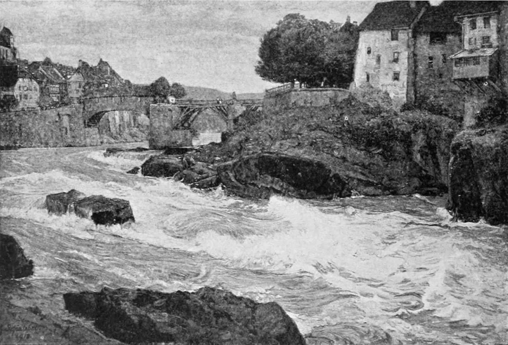 Le Rhin à Laufenburg